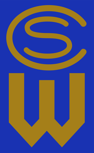 Wappen von SC Wacker Leipzig